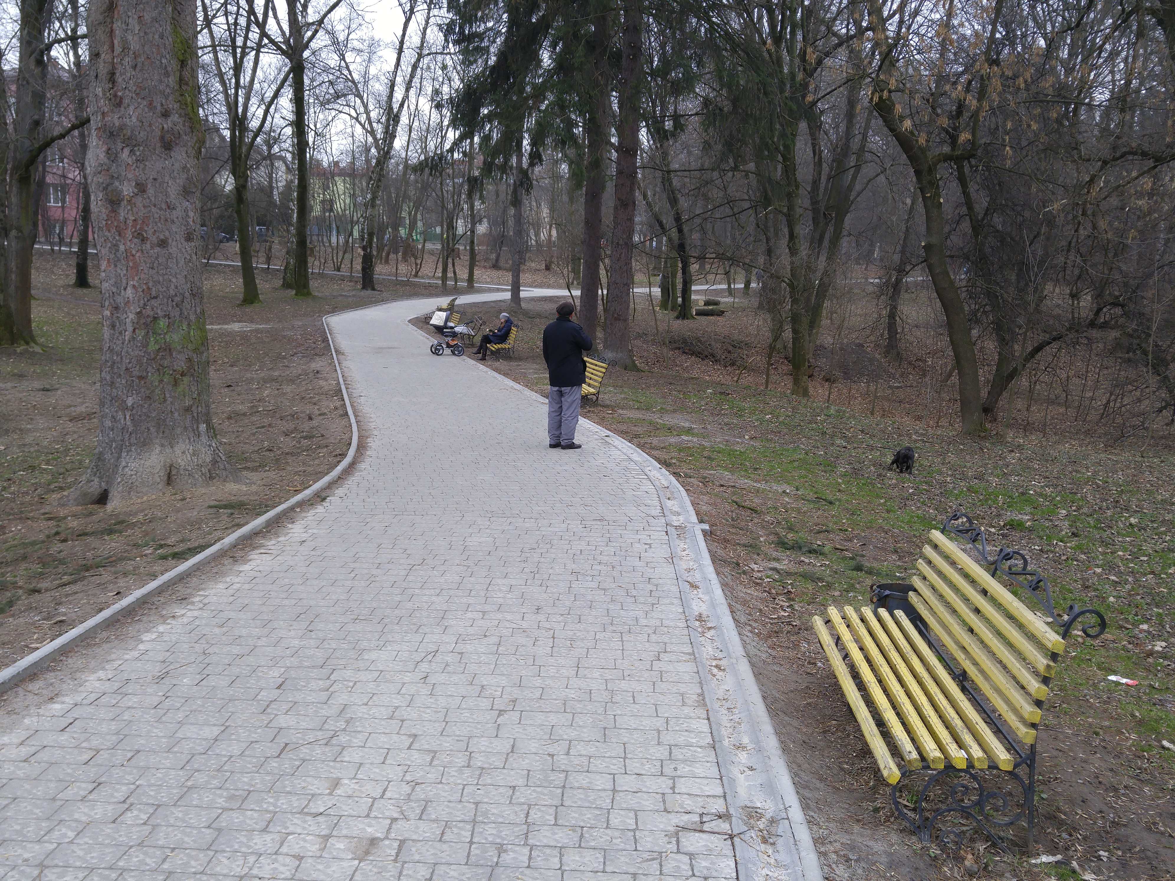 Львів, парк Залізна Вода, центральна алея